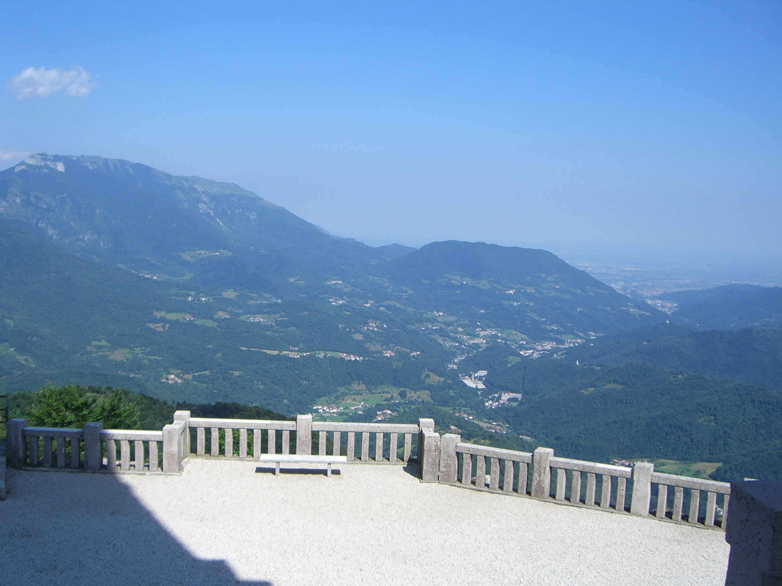 Veduta della vallata dalla sommittà della torre dell'ossario del Pasubio